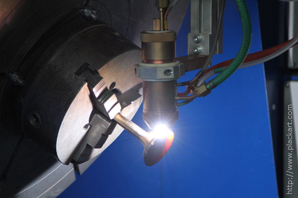 Наплавка износостойкого материала на рабочую поверхность на заводе в Щербинке